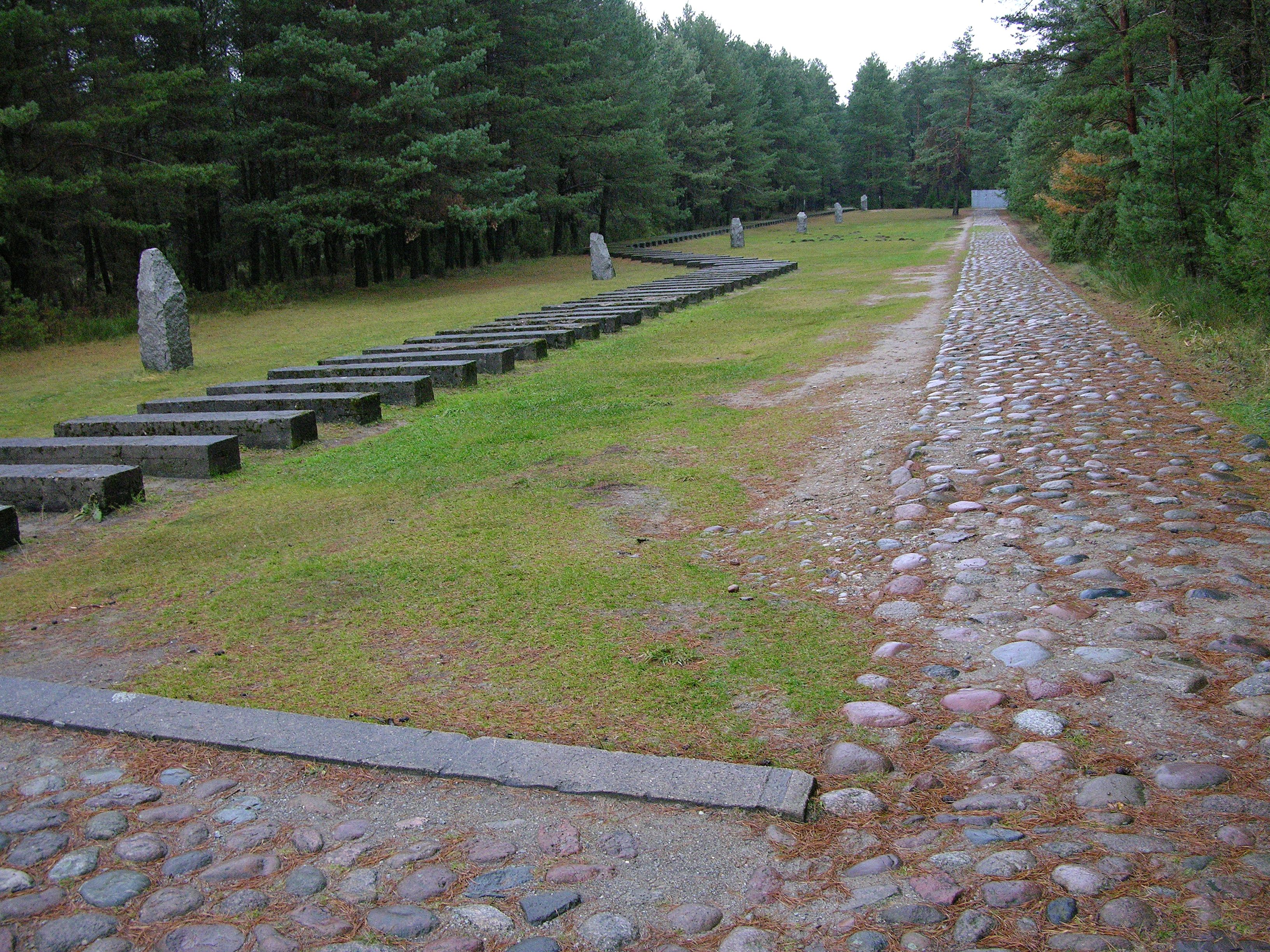 Pomnik Ofiar Obozu Zagłady w Treblince